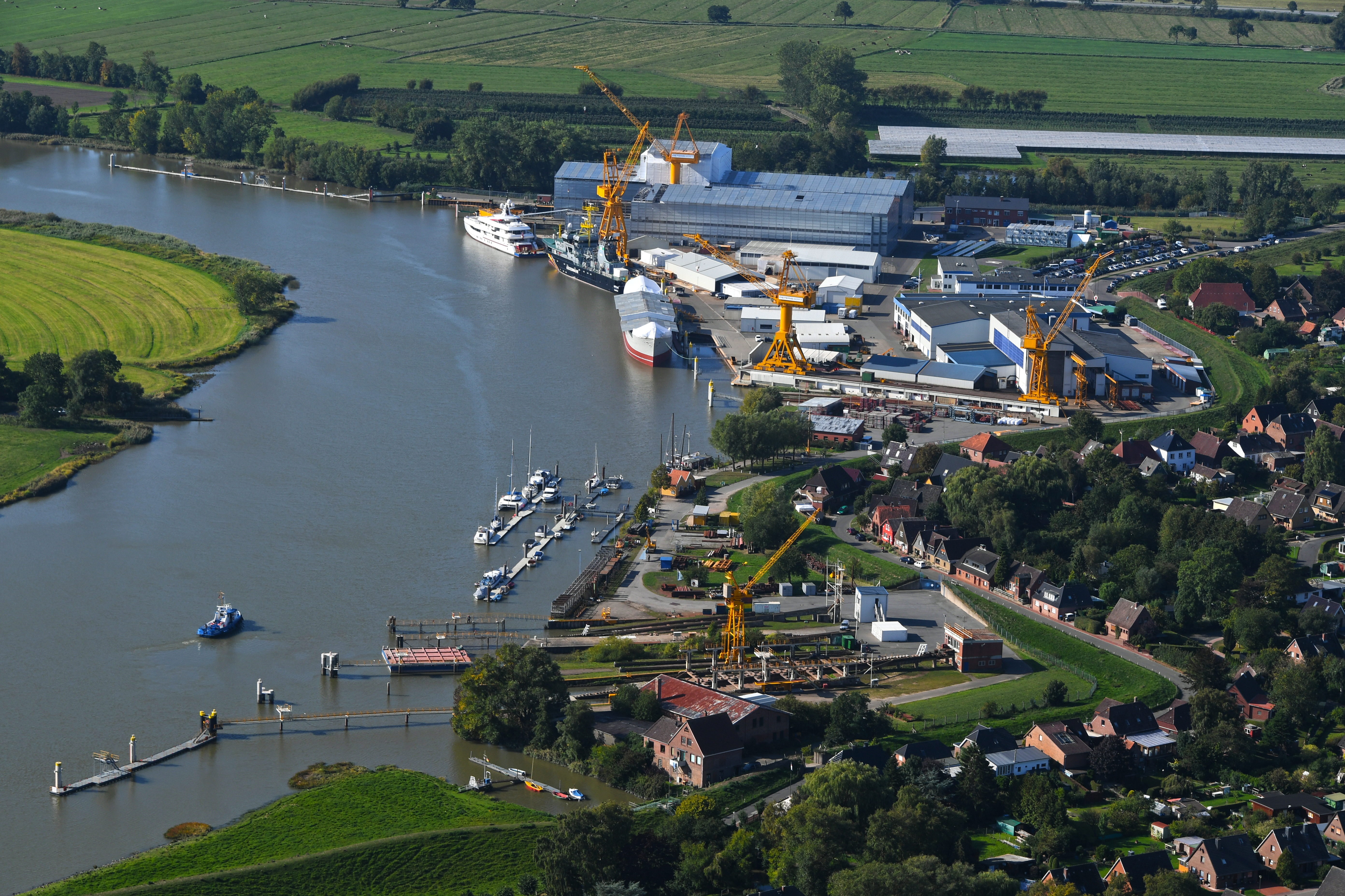 Das Werftgelände vom September 2018. Im unteren Teil sieht man die Slipanlagen und den kleinen Botshafen von Wewelsfleth. Im oberen Teil ist dann das Hauptgelände abgebildet mit der "Peking", der "Seefalke" und der MY "Forever One" am Ausrüstungskai. Die flexiblen Wetterschutzhallen stehen jeweils seit 2016 und 2017.